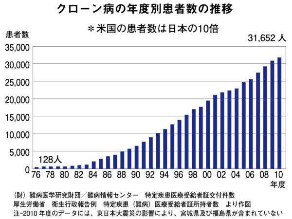 年次別のクローン病患者数